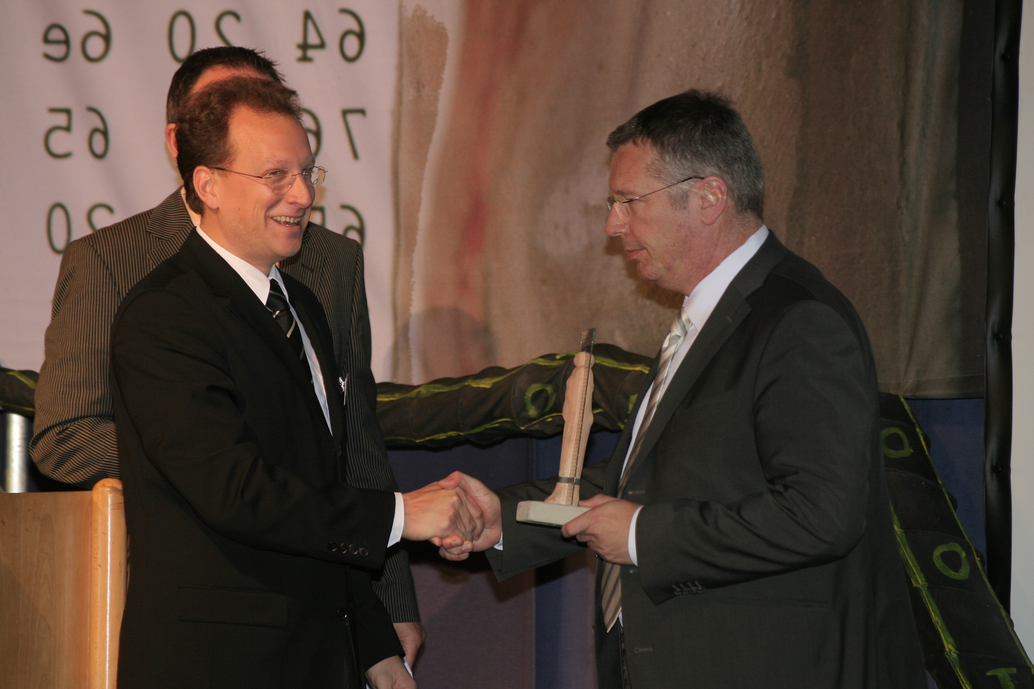 Der Datenschutzbeauftragte der Deutschen Telekom AG, Dr. Claus-Dieter Ulmer (rechts im Bild), nimmt den Big Brother Award entgegen.